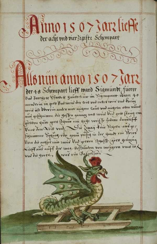 Ein Basilisk als Hölle beim Schembartlauf 1507. (Staatsbibliothek Berlin, Ms.germ.fol.492)